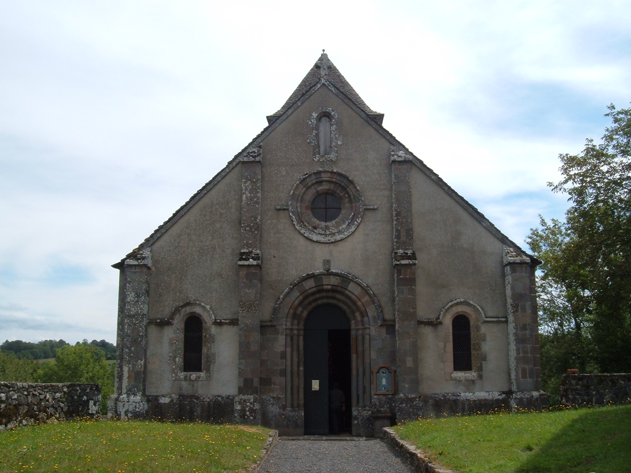 Paroisse de Brageac, ancienne abbaye des Filles de Brageac